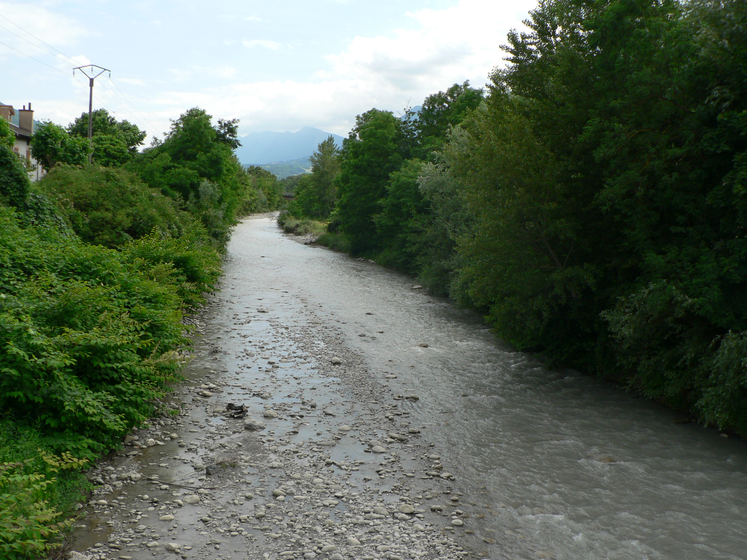 La Gresse à Vif, Isère, AuRA, France.